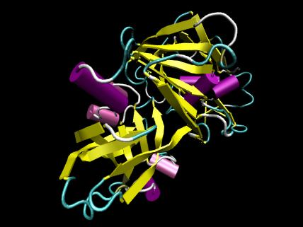 Pepsin; Strukturdarstellung auf Grundlage der Daten aus der Protein Data Bank (PDB); PDB ID 1AM5; Bearbeitet mit VMD, gerendert mit POVray